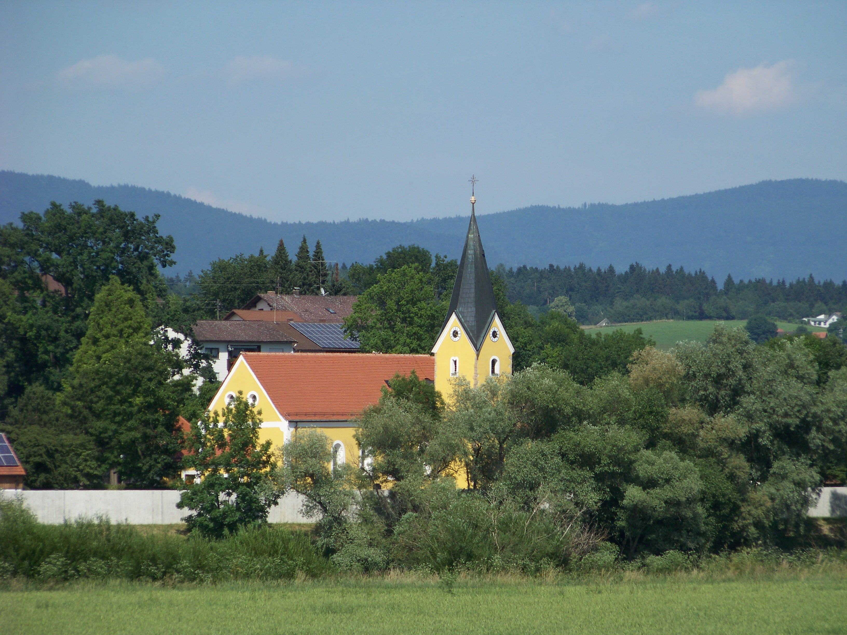 Bogen, Pfelling 1. Katholische Pfarrkirche St. Margaretha. Turm spätromanisch, Langhaus Ende 13. Jahrhundert, 1882 verändert, Chorneubau 1907; mit Ausstattung. Fotografiert vom Südufer der Donau zwischen Entau und Ainbrach.